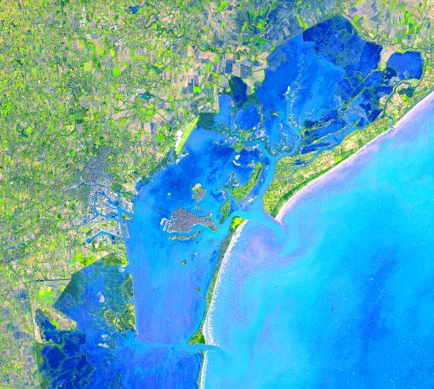 Venetië Transferred from nl.wikipedia to Commons by :User:Rex|Rex .